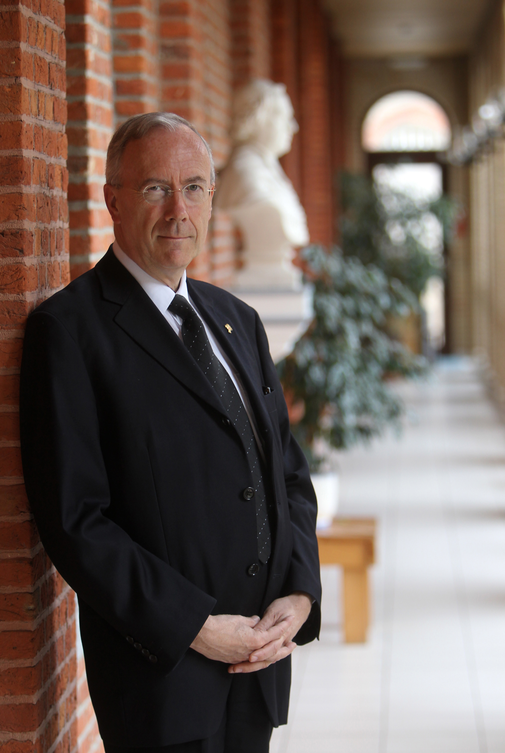 Portret van Broeder René Stockman, generaal overste van de Broeders van Liefde.